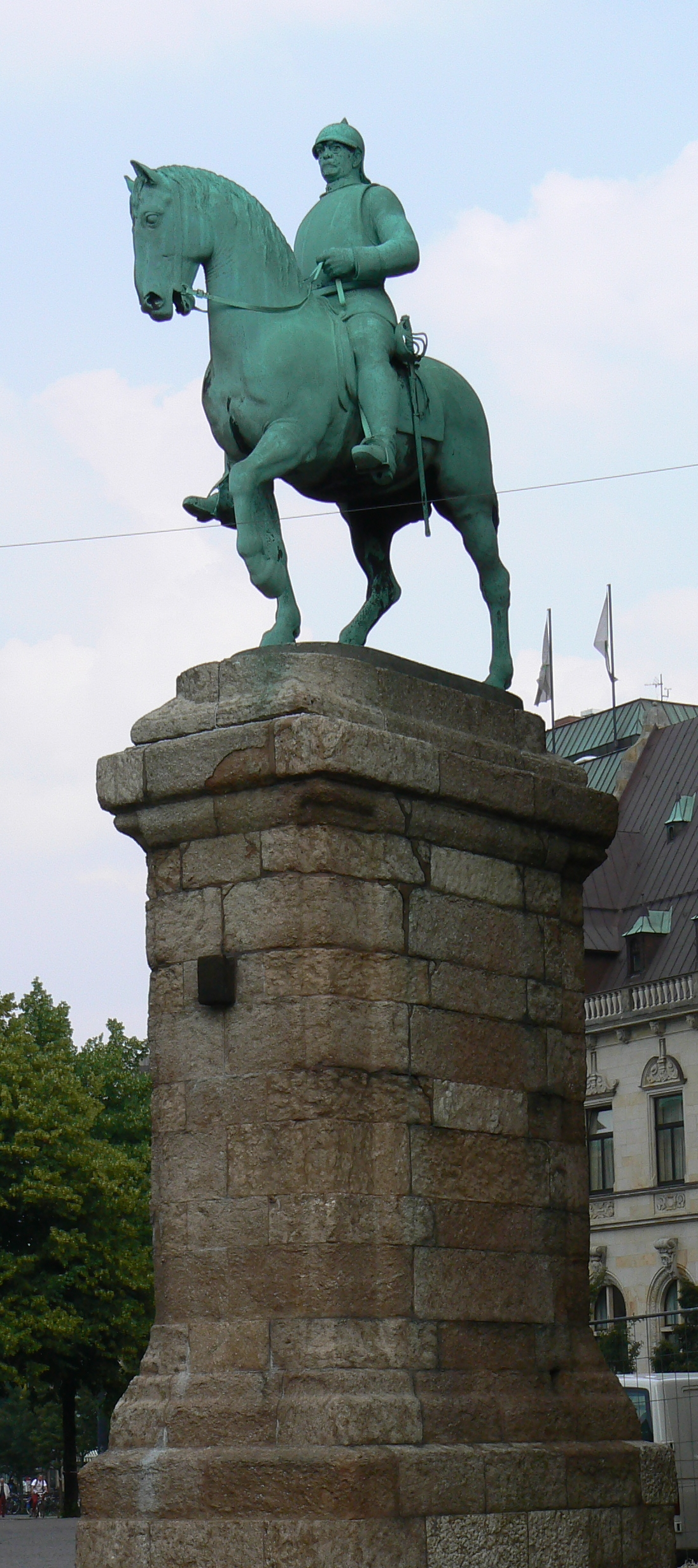 Bismarck-Denkmal, Reiterstandbild Otto von Bismarck in Bremen, Am Dom.Das abgebildete Objekt ist ein geschütztes Kulturdenkmal in der Freien Hansestadt Bremen, mit der Nr. 0055 beim Landesamt für Denkmalpflege registriert.